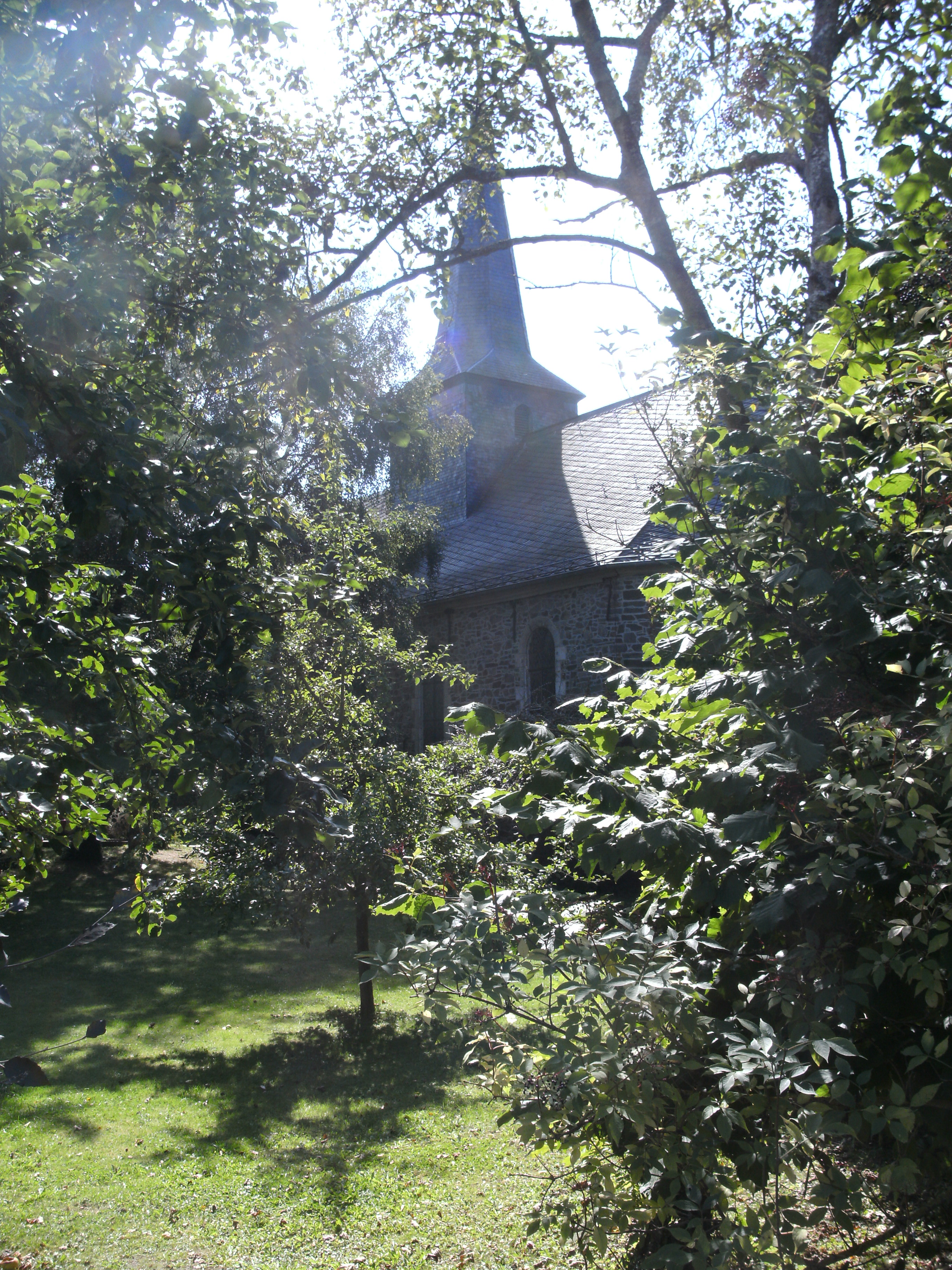 Außenansicht des evangelischen Kirchengebäudes in Zweifall